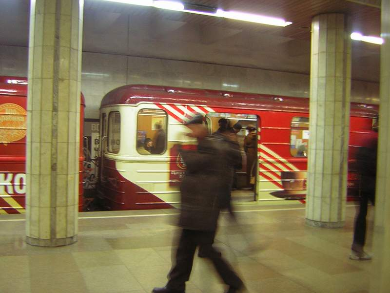 Novosibirsk metro train in Sibirskaya station.